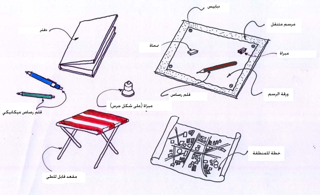 le descrizioni scritti in arabo fanno riferimento all'immagine presa da questo sito